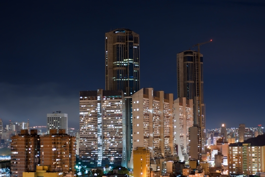 Son las torres mas altas de América del Sur.